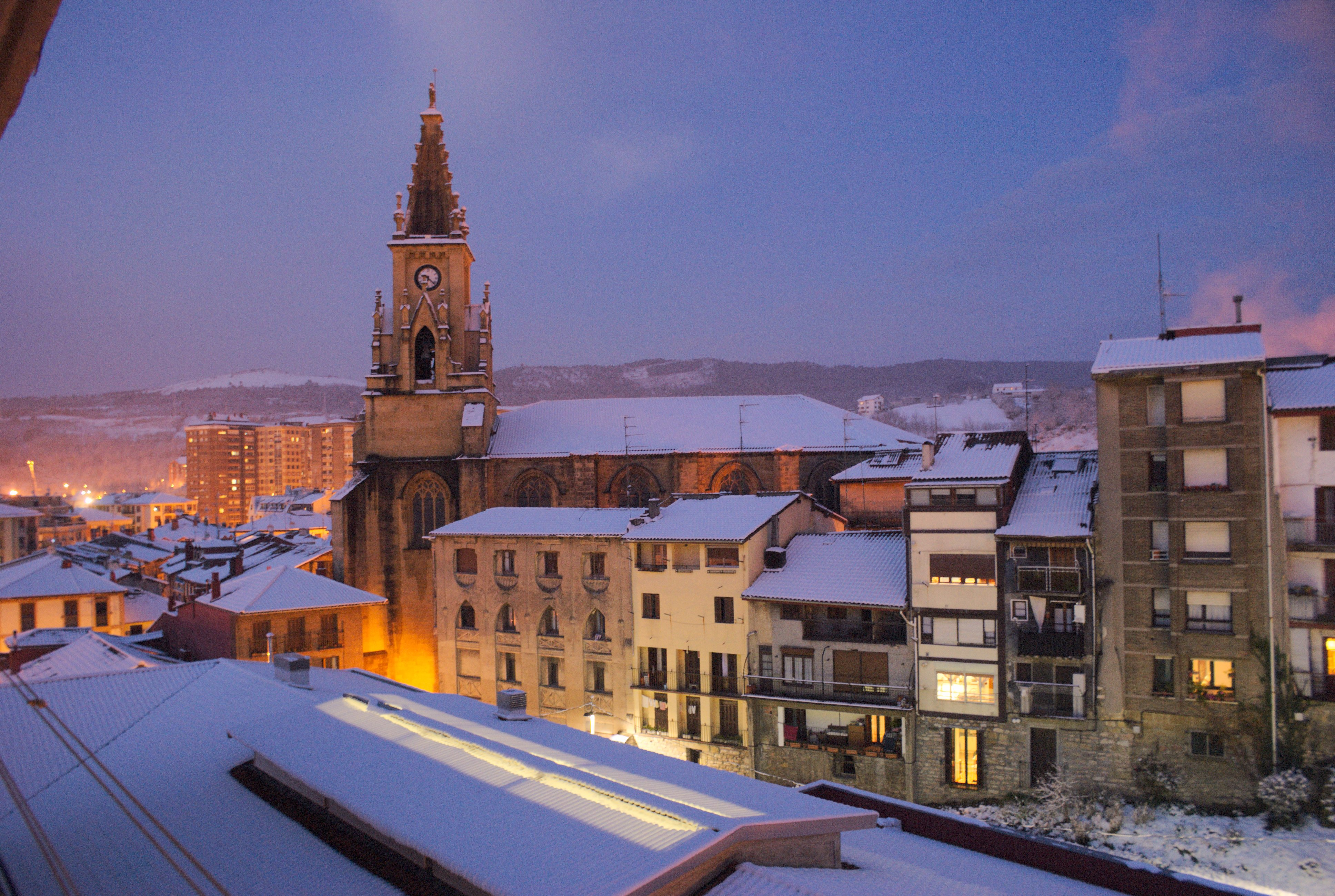 Jasokundearen Eliza Errenterian elurtua